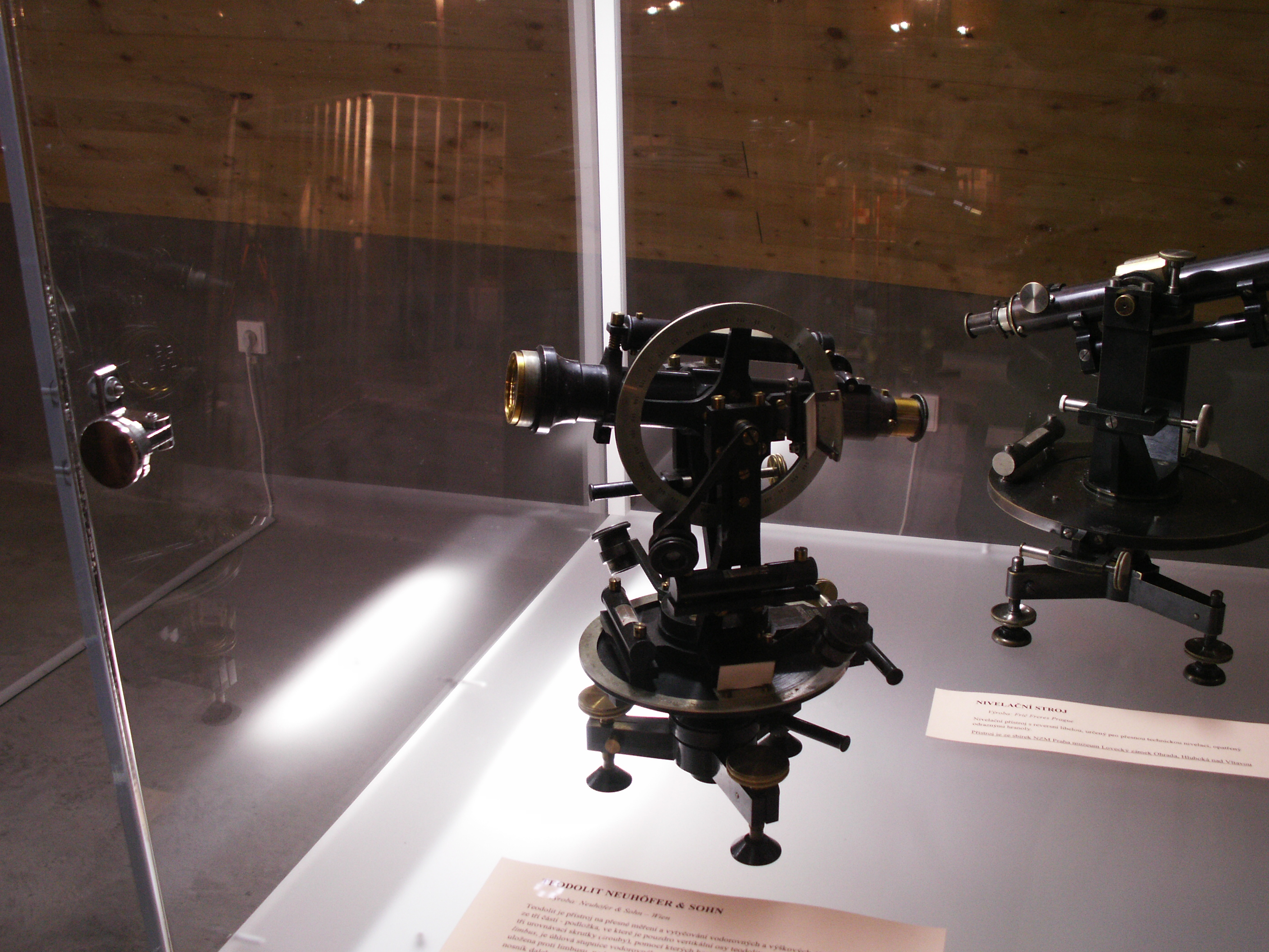 Teodolit firmy Neuhöfer&sohn ze sbírek Moravského kartografického centra Velké Opatovice